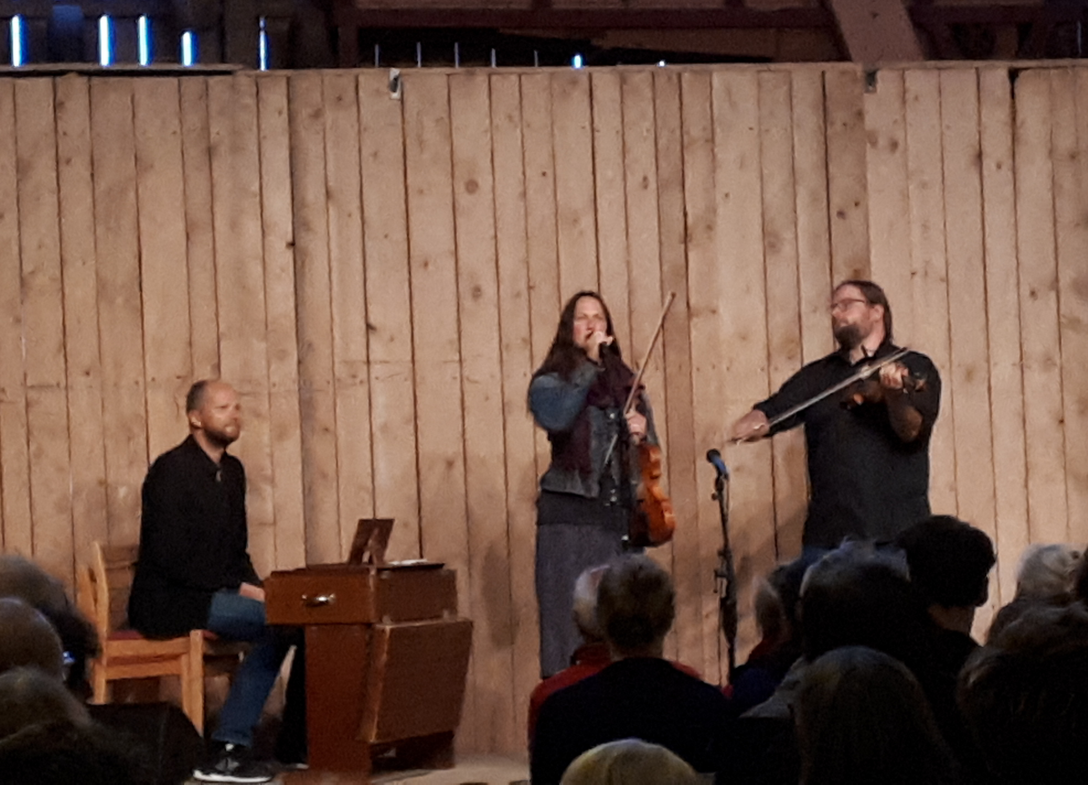 Folkmusikgruppen Triakel spelar på Ornungastämman i Stommens loge lördagen den 11 augusti 2018.